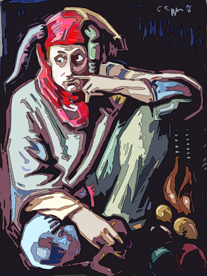 Der Nasenbohrer, eine Algographie von Carsten Eggers